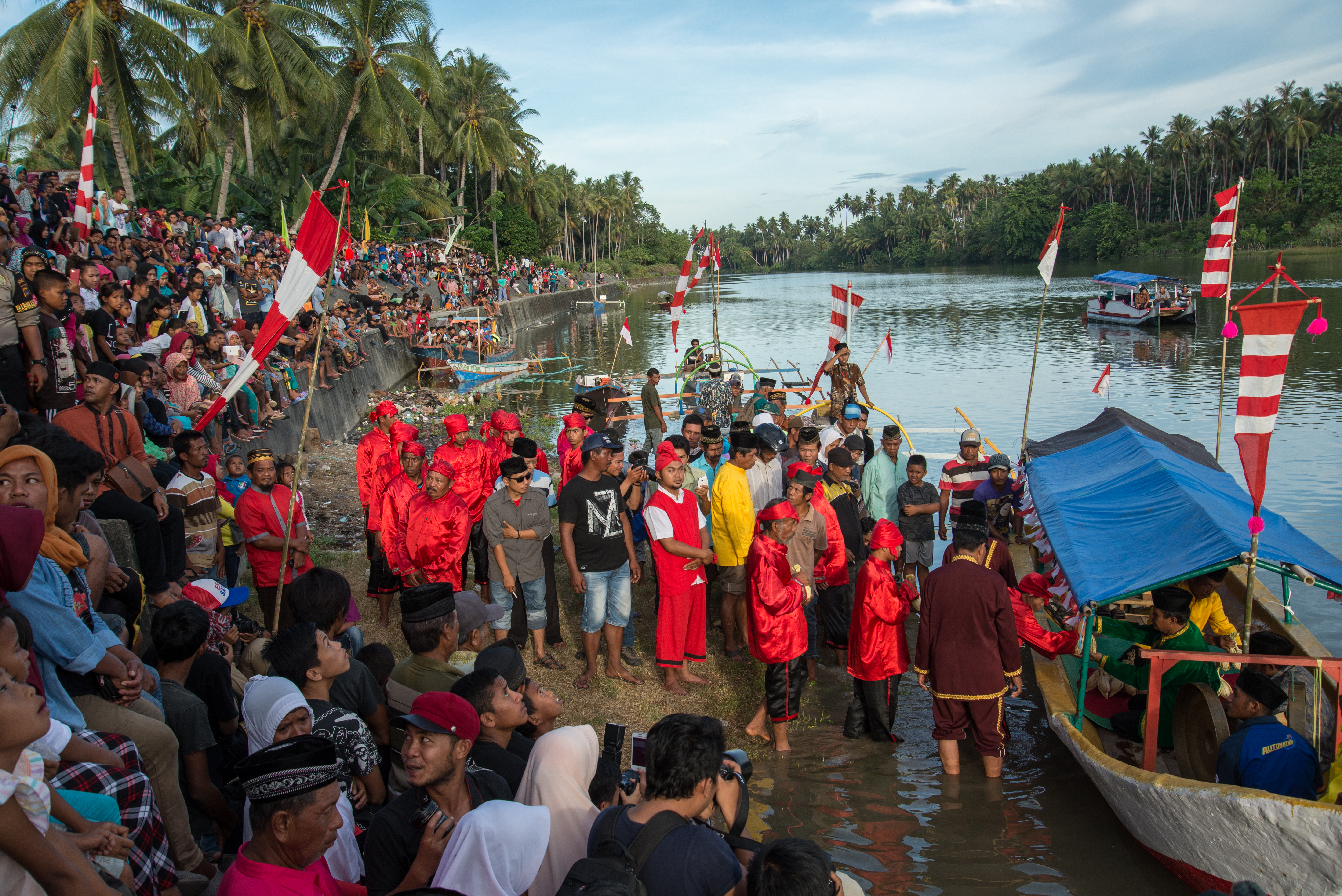 Malabot tumpe adalah upacara syukuran atas panen telur maleo